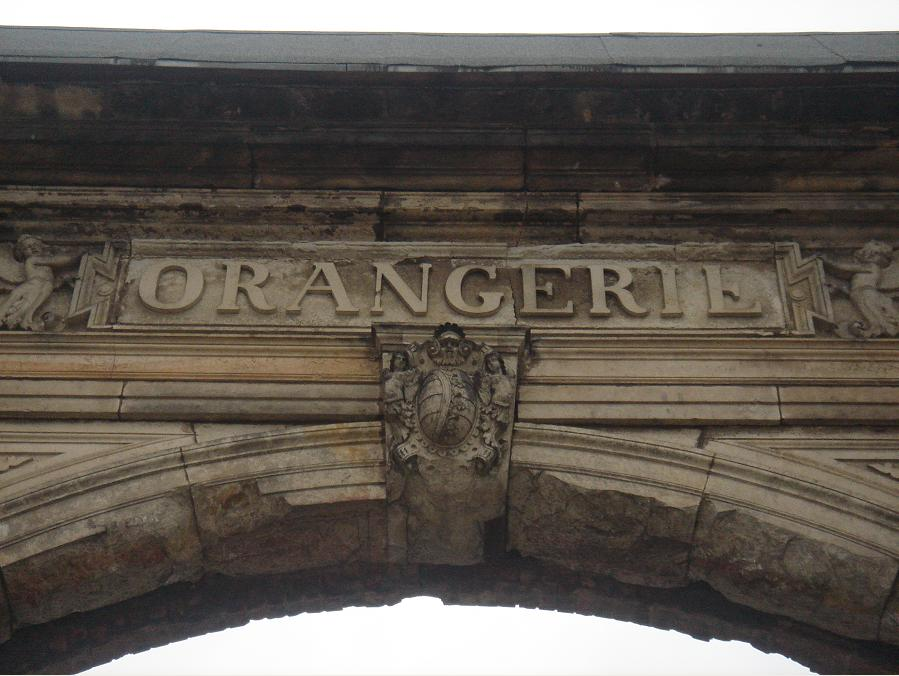 Detail am Portal des ehemaligen Orangeriegebäudes in der Herzogin Garten, Ostraallee, Wilsdruffer Vorstadt, Dresden